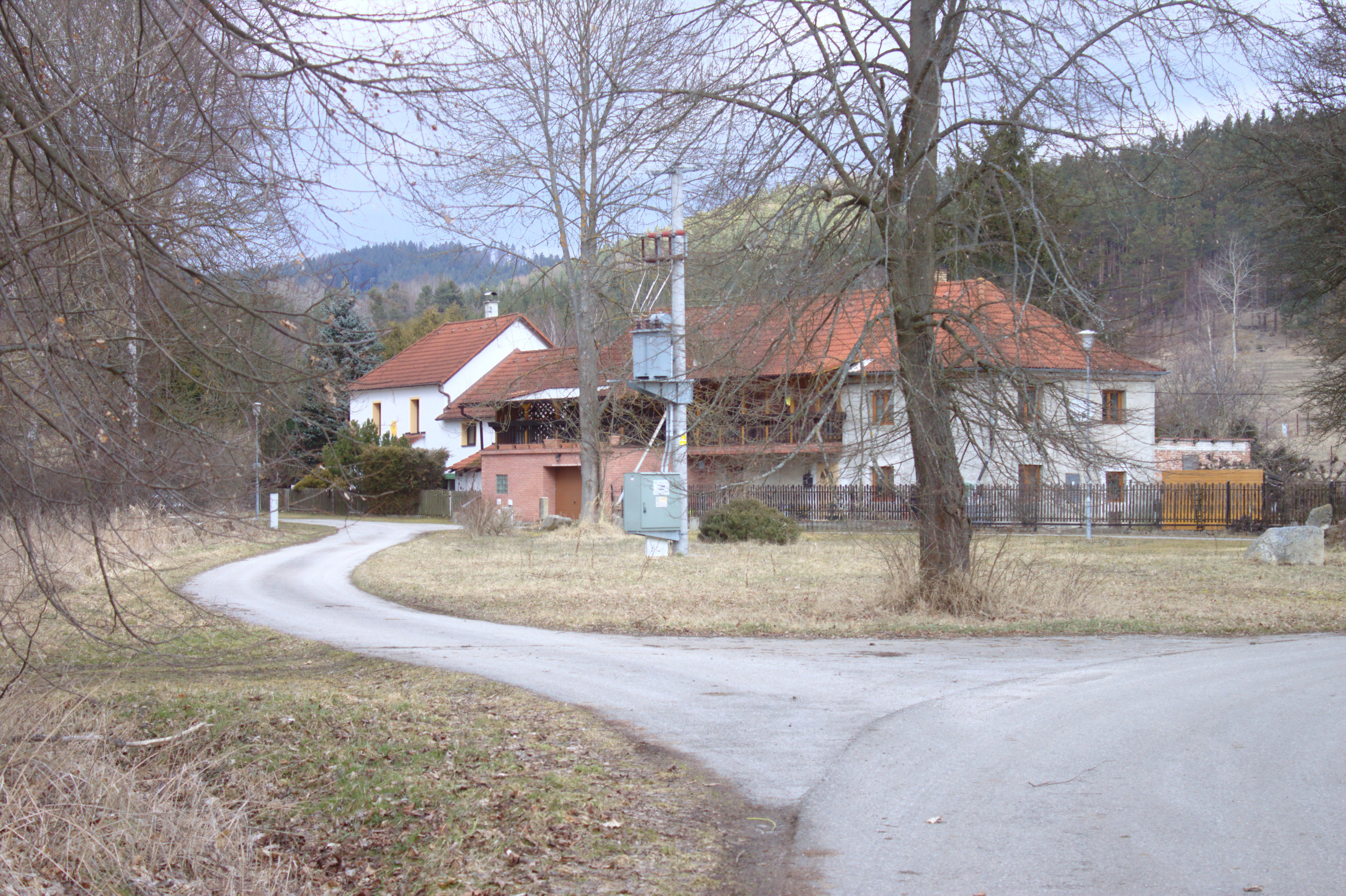 Zatáčka ve vesnici Lazec Project: Fotíme Česko